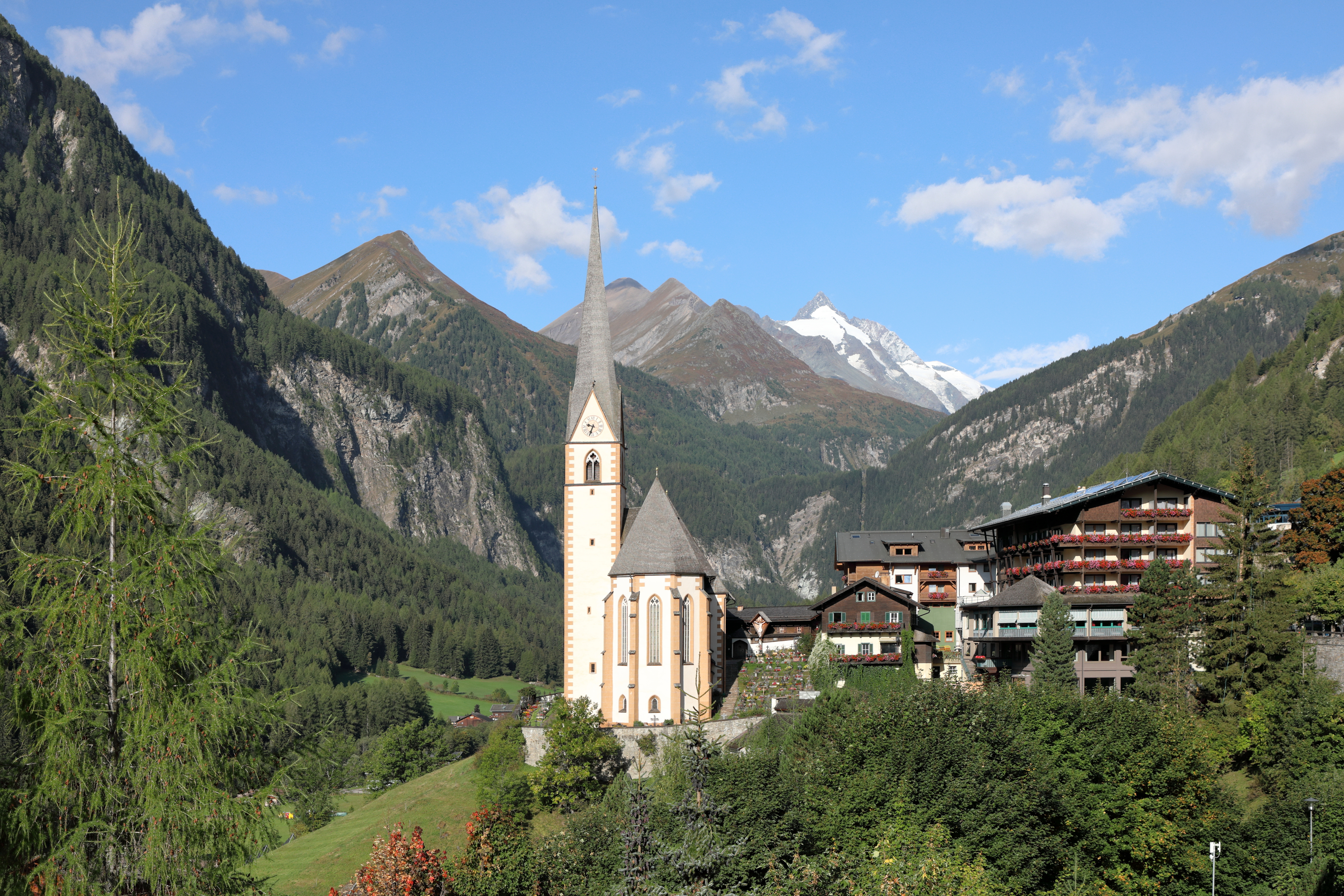 Ostsüdostansicht des Ortszentrums der österreichischen Gemeinde Heiligenblut am Großglockner in Kärnten mit dem Großglockner im Hintergrund.